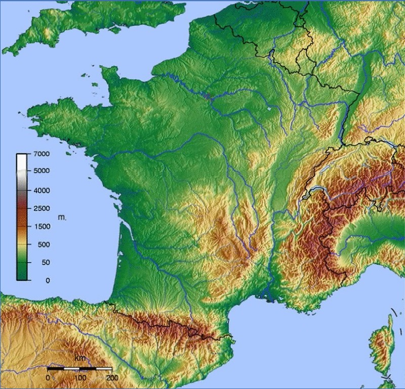 Carte France GMT relief